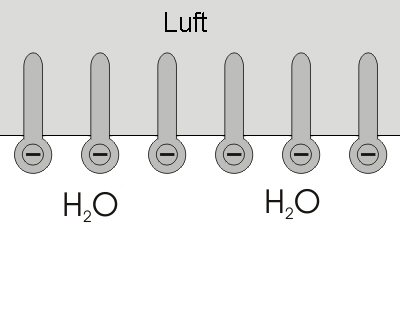 Estrato superficial de un tensoactivo, Fuente: Autor: Robert Kropf Origen Bild:Oberflächenschicht.PNG Bild:Oberflächenschicht.PNG